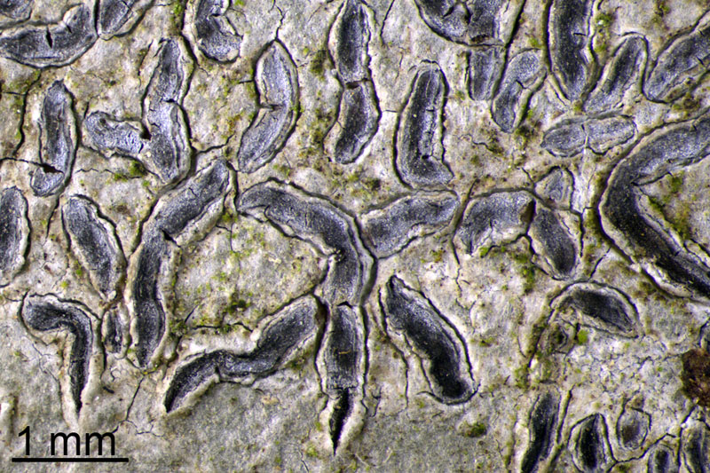 Graphis scripta (L.) Arch.